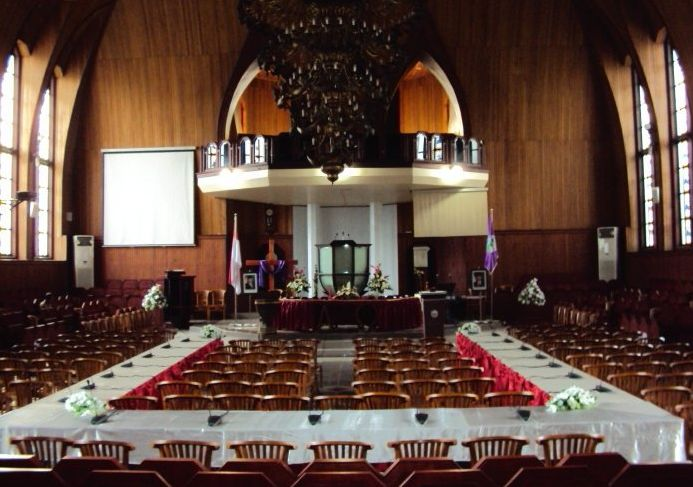 Ini adalah interior Gereja Joseph Kam, Ambon. Foto ini diambil oleh Lista Irene Hehanussa dan digunakan atas seizin pemiliknya.